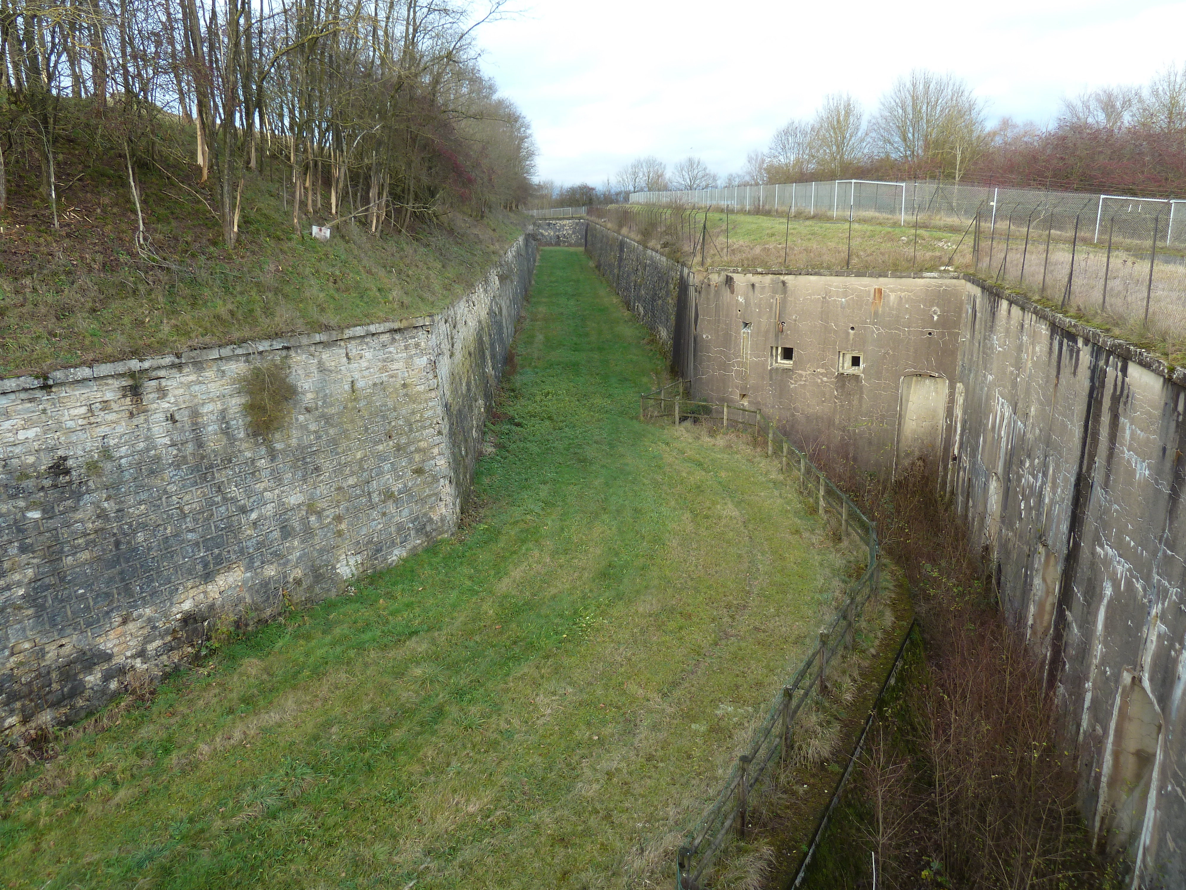 Fort ordener